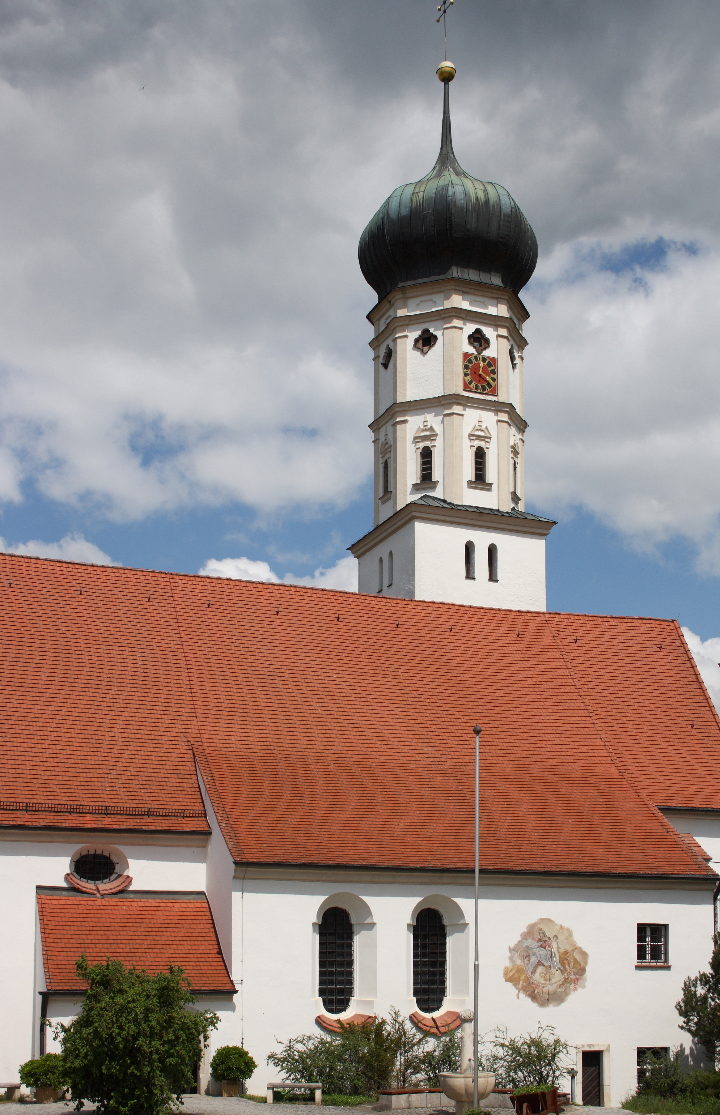 Katholische Wallfahrtskirche Mariä Himmelfahrt in Buggenhofen, einem Ortsteil von Bissingen im Landkreis Dillingen an der Donau (Bayern)